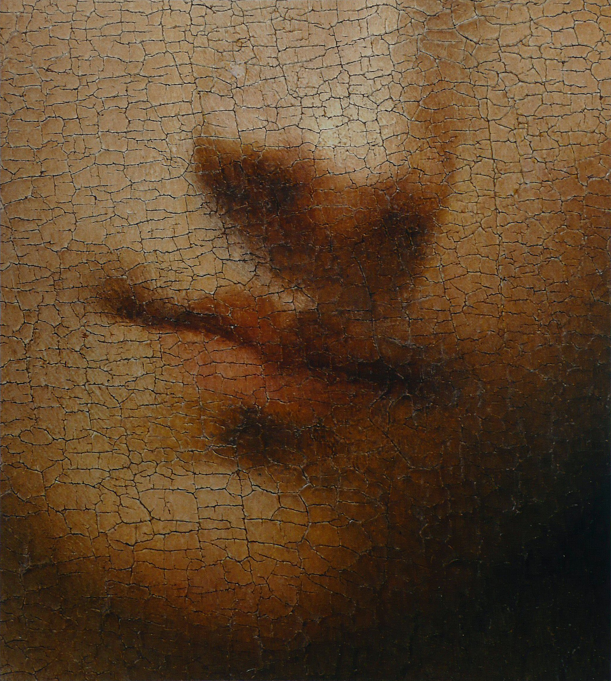 detail